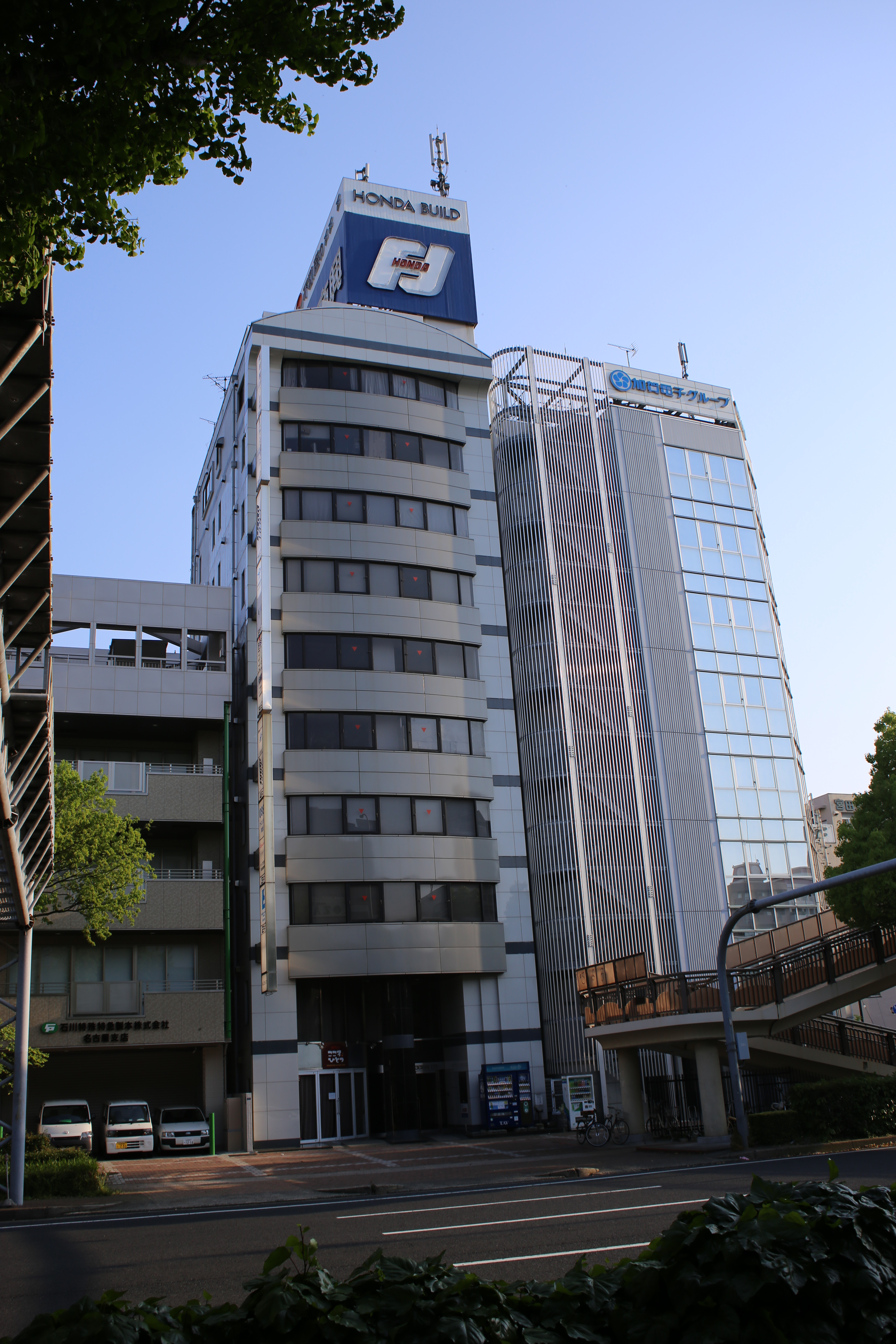 名古屋市中区大須一丁目のACCESS175ビル・加賀ビルを北側公道より撮影